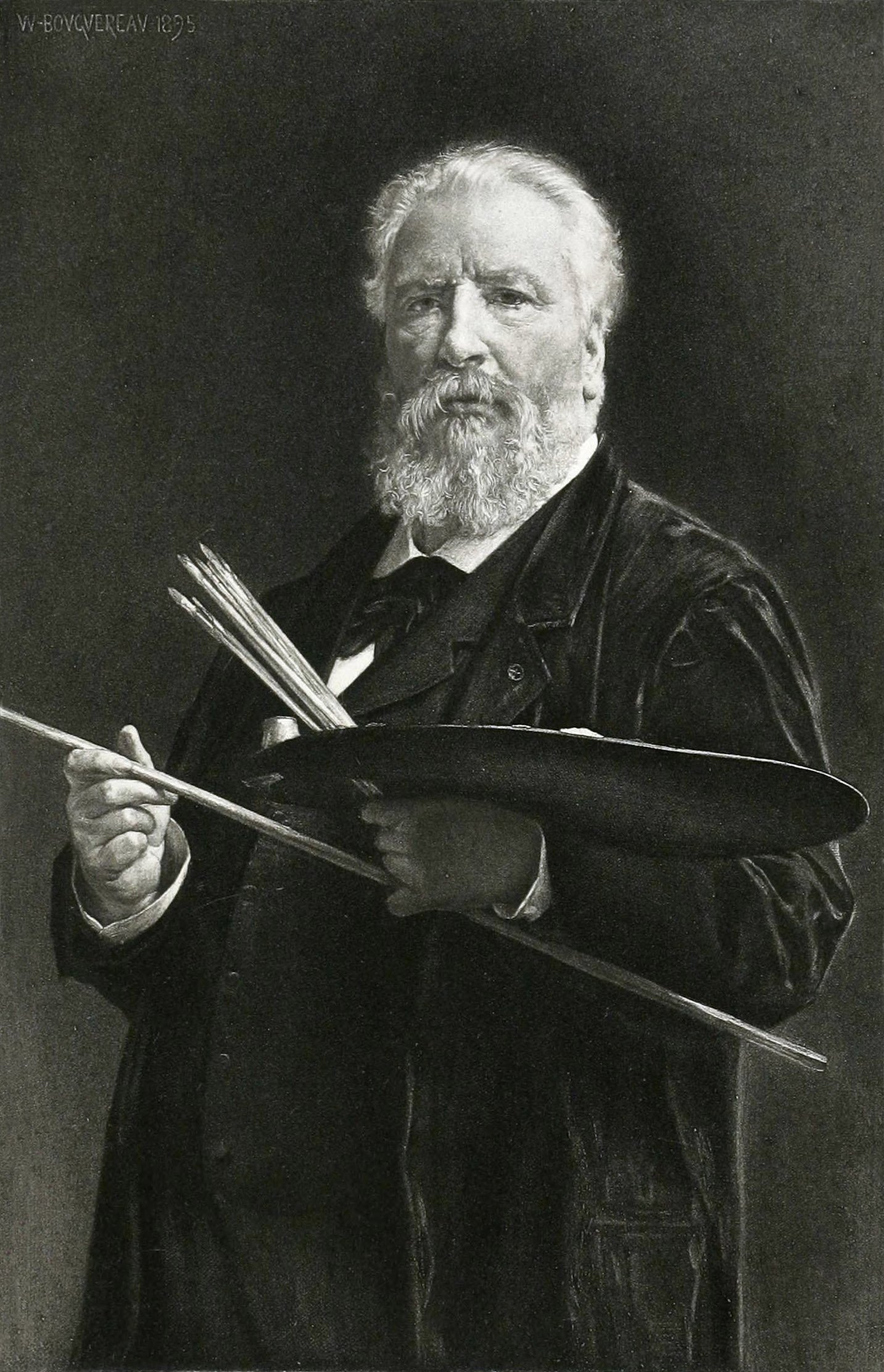 Autoportrait de William-Adolphe Bouguereau